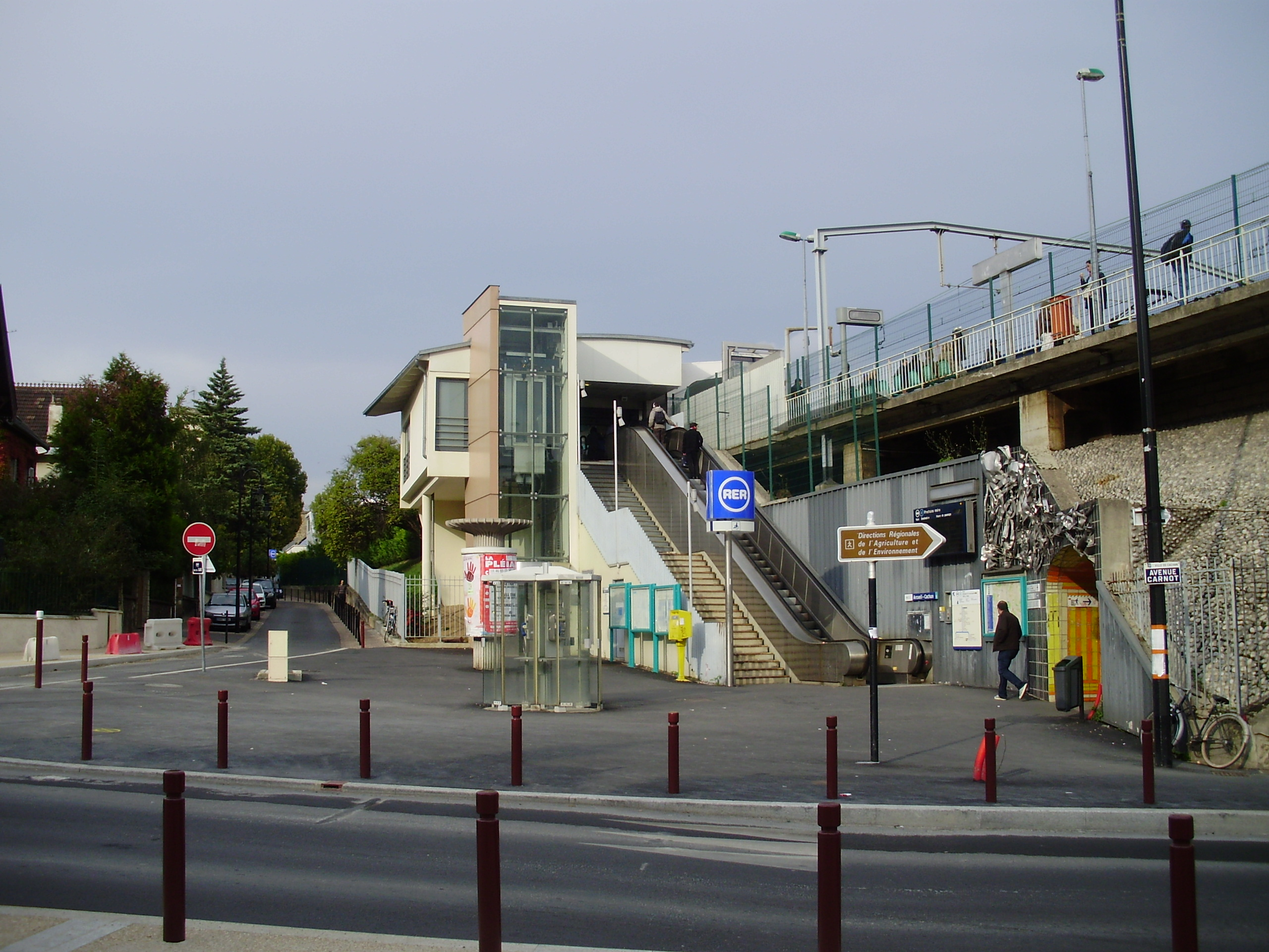 Gare d'Arcueil - Cachan, à Cachan, Val-de-Marne, France (entrée principale sur l'avenue Carnot à l'ouest des voies)